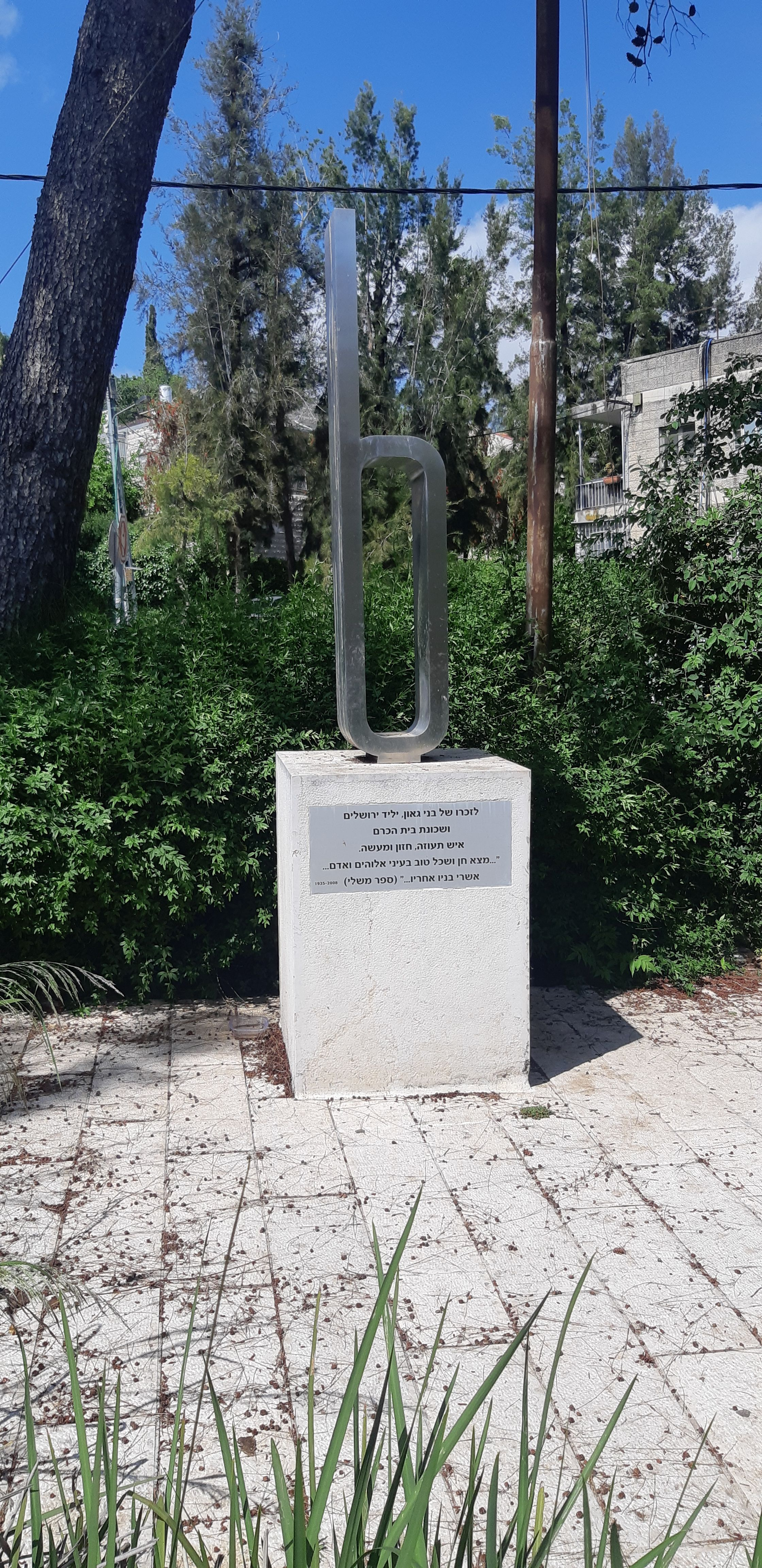 אנדרטה בבית הכרם לזכרו של בני גאון